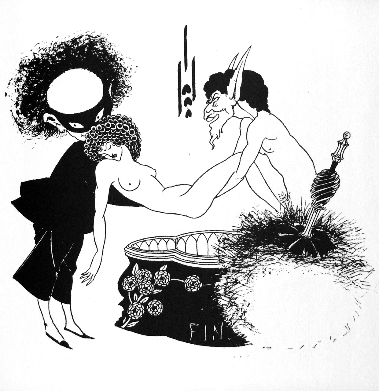 Beardsley, Aubrey Vincent Entstehungsjahr: 1893 Maße: 16,5 × 17,5 cm Technik: Tinte Aufbewahrungsort: Cambridge (Massachusetts) Sammlung: Fogg Art Museum Epoche: Jugendstil